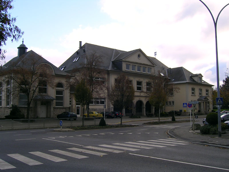 Primärschoul Bieles